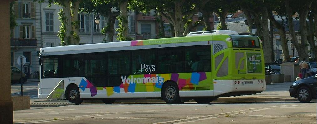 Heuliez GX327 (2011)